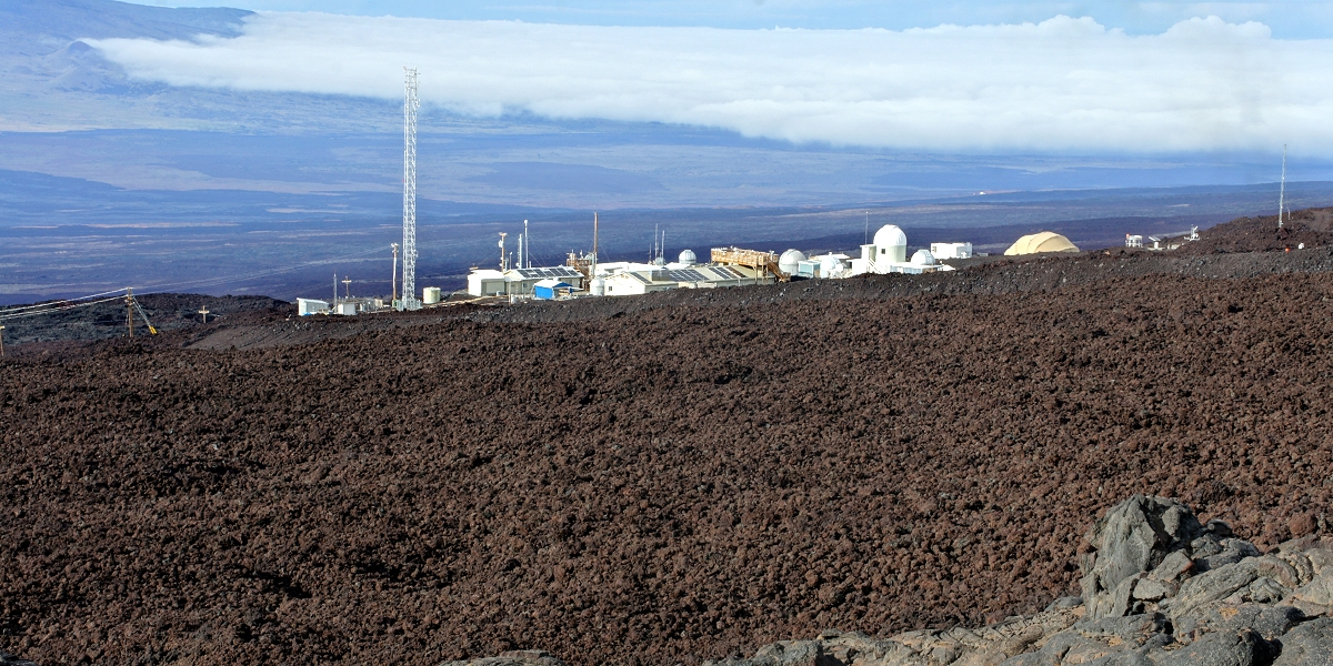 Иллюстрация для викиучебника Гавайеведение